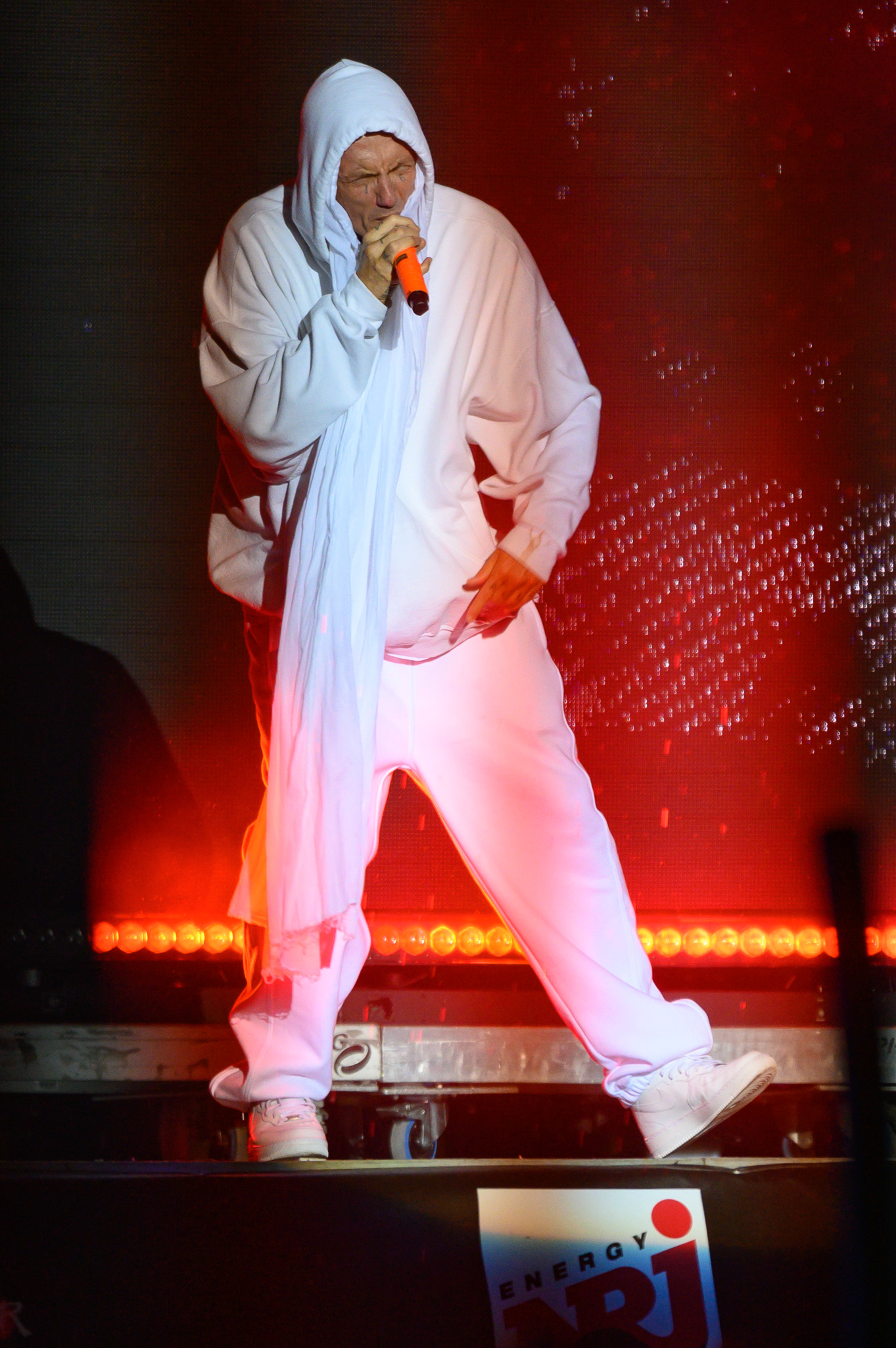 ARGO-Konzerte,Beck's Park Stage,Die Antwoord,Konzert,Livekonzert,Livemusik,Musik,Ninja,RiP,Rock im Park 2019,Watkin Tudor Jones